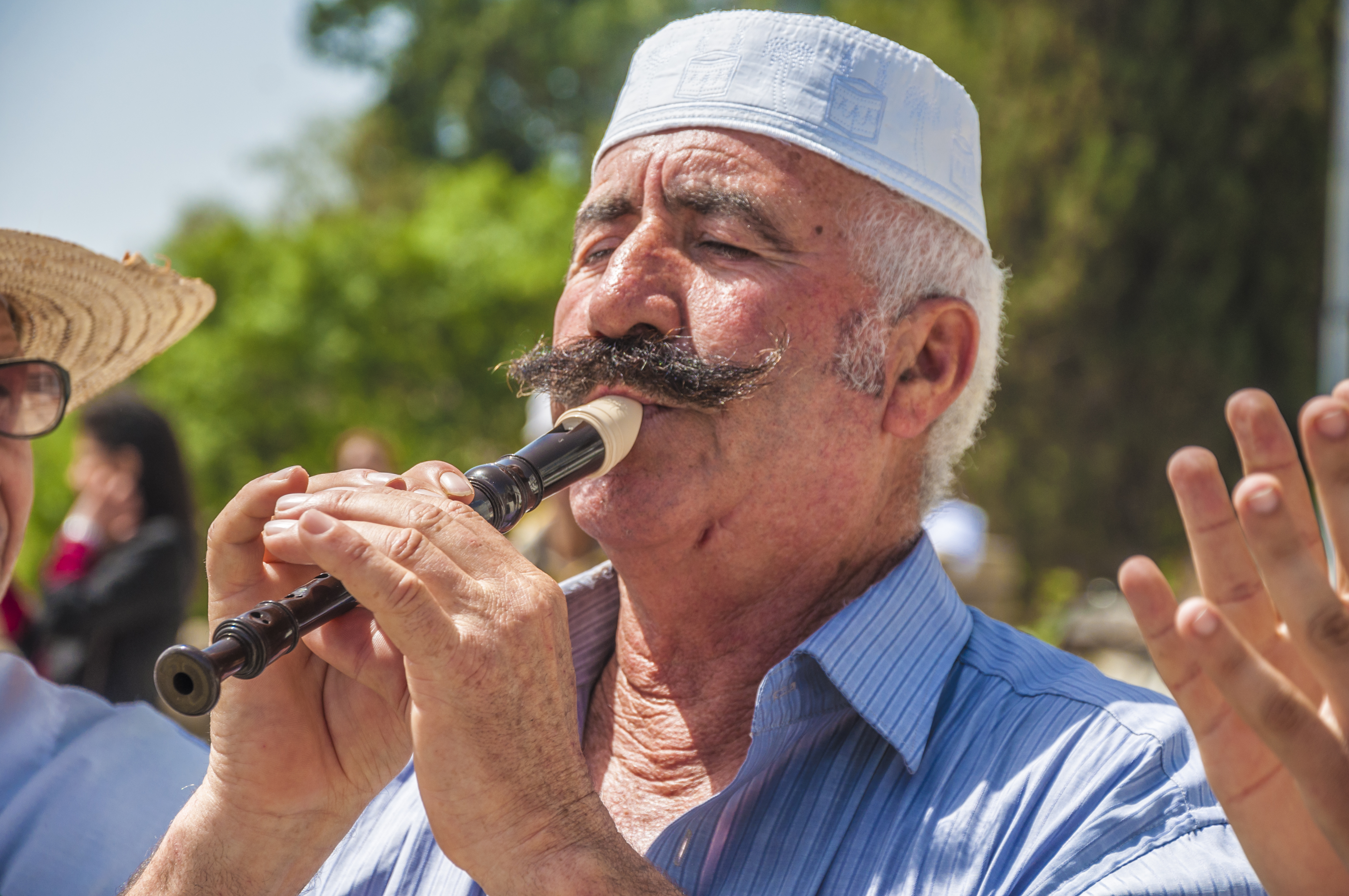 tradition kabyle bejaia algerie This is an image with the theme "Play" from: Algeria